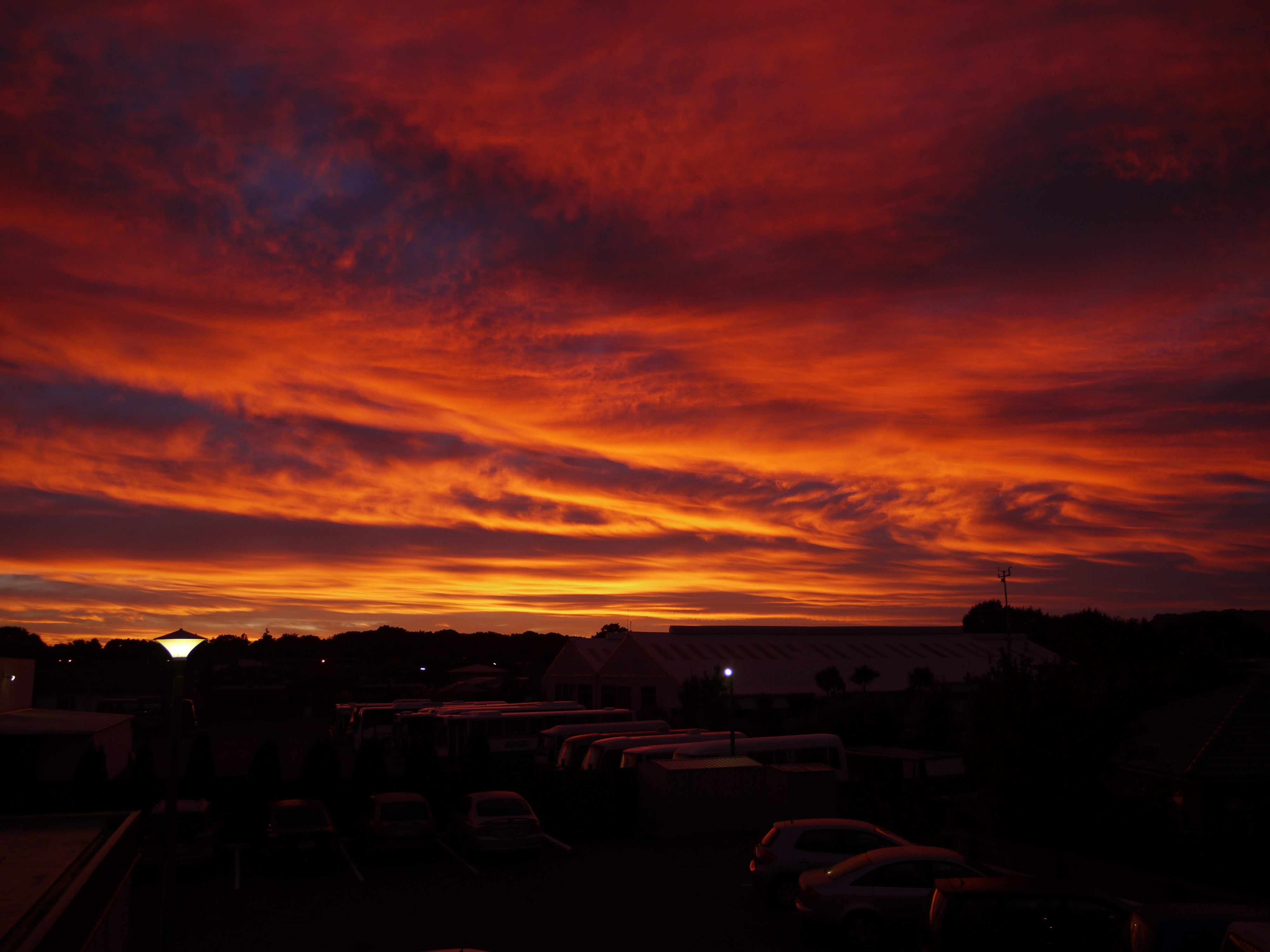 Zonsopkomst in Riccarton, Christchurch.